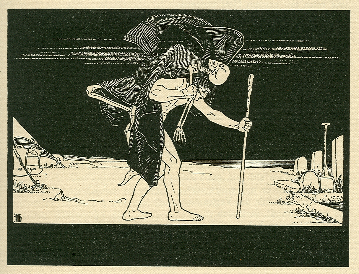 Dybbuk